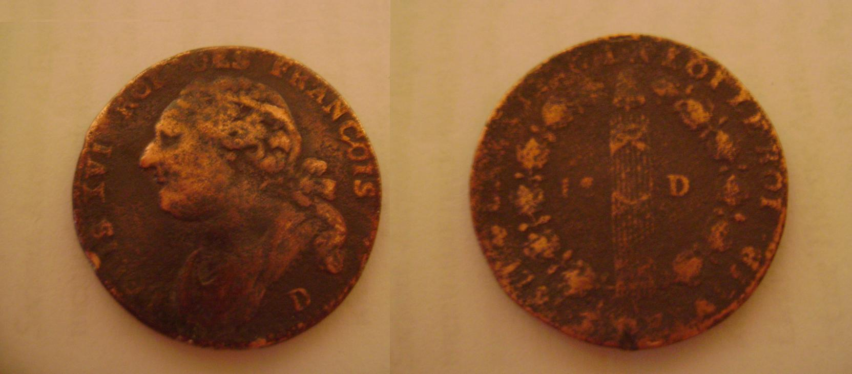 Moneda francesa de 1791. En el anverso aparece el busto del rey Luis XVI. En el reverso aparece el fascio con el gorro frigio, símbolos propios de la Asamblea Nacional Constituyente, que luego pasarían a asociarse completamente con la Primera República Francesa. Lleva la inscripción «la nation la loi le roi» («la nación la ley el rey»), y la fecha «1791 - 3 de la lib» («1791 - año 3 de la libertad»).